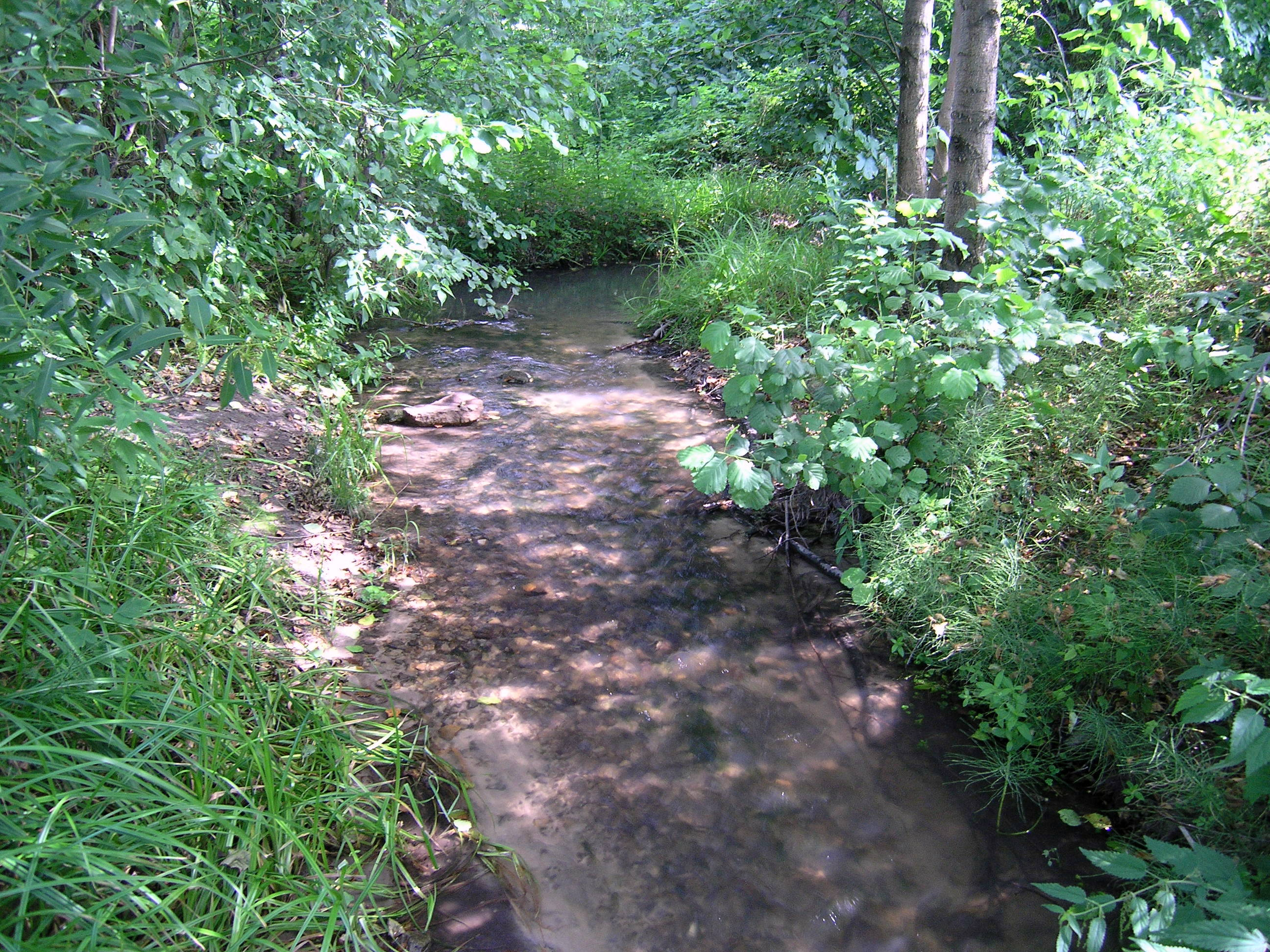 Река Уса, недалеко от истока. Район деревни Смолькино, Сызранский район Самарской области